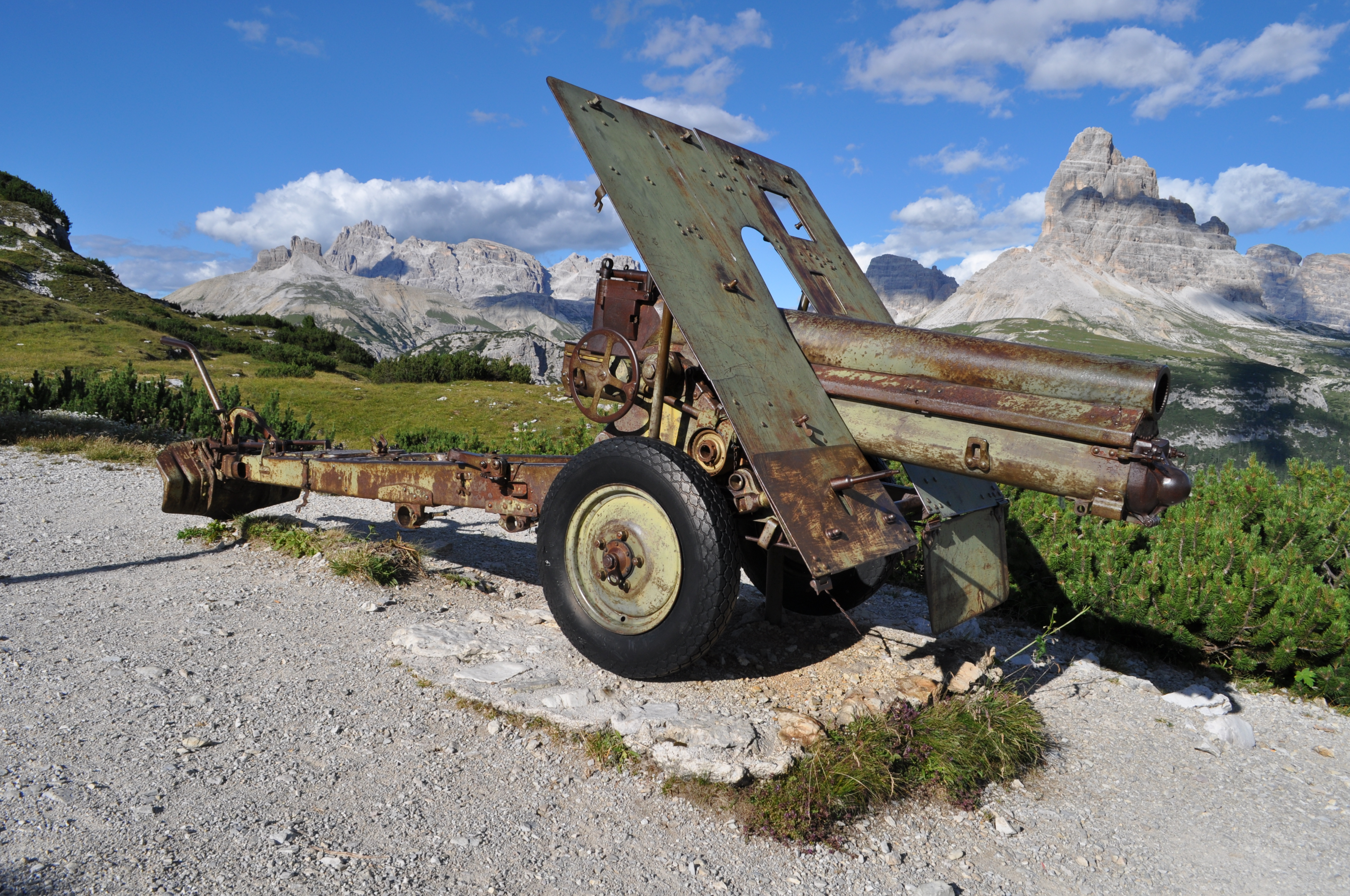 100 mm Skoda Gebirgshaubitze M16. Die Gummibereifung weist darauf hin, daß das Geschütz von de Italienern bei Kriegsende erbeutet und modifiziert wurde.